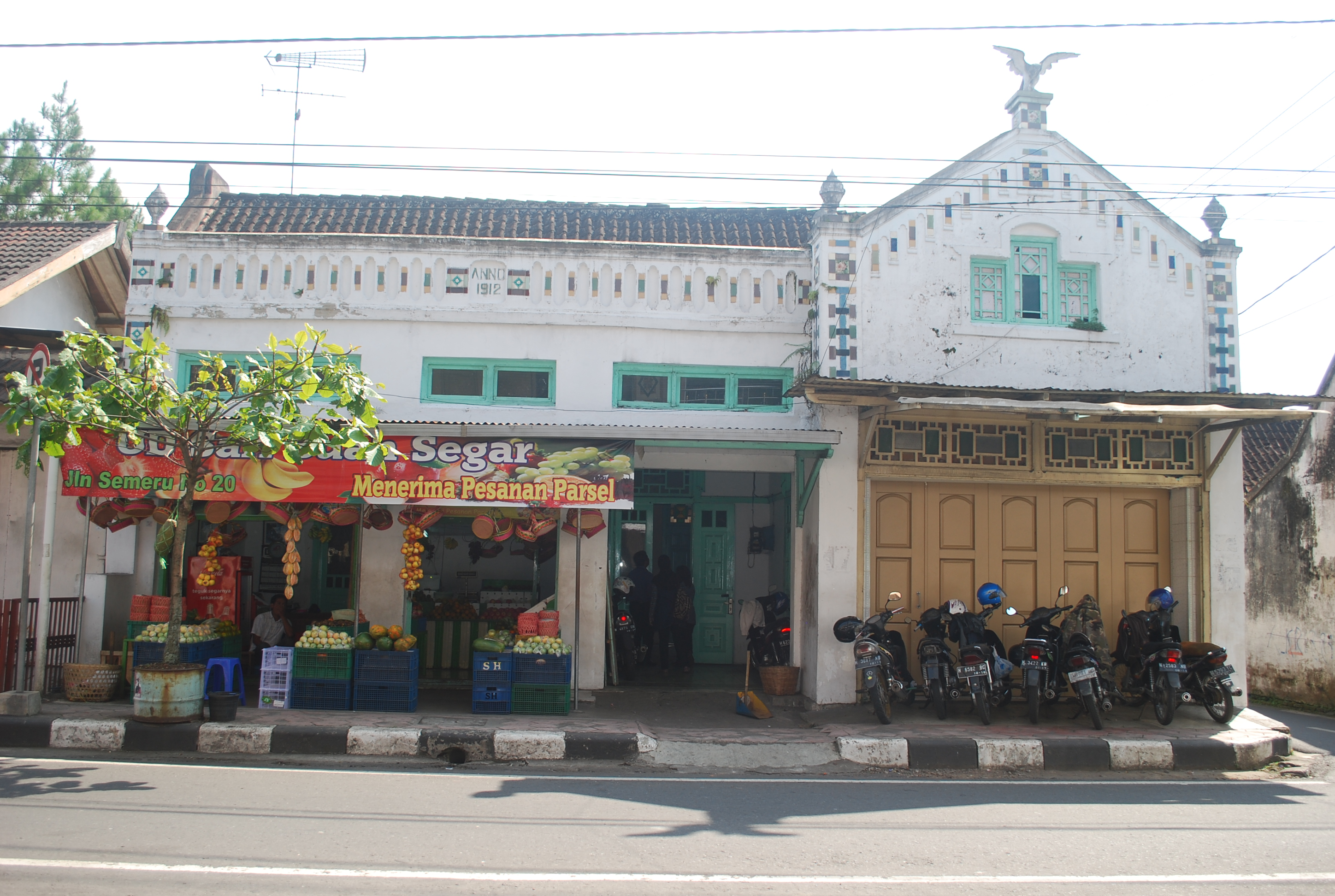 Toko Aneka Jaya adalah bangunan cagar budaya yang terletak di Jalan Semeru No. 20, Kelurahan Kalicacing, Kecamatan Sidomukti, Kota Salatiga, Provinsi Jawa Tengah. Rumah toko ini merupakan salah satu bukti fisik yang mewakili kawasan pecinan di Kota Salatiga pada masa pemerintahan gemeente (kotapraja). Kondisi fisik bangunan rumah toko tersebut kurang terawat pada 2020, tetapi bentuk depannya masih asli dengan ciri khas bangunan kolonial.